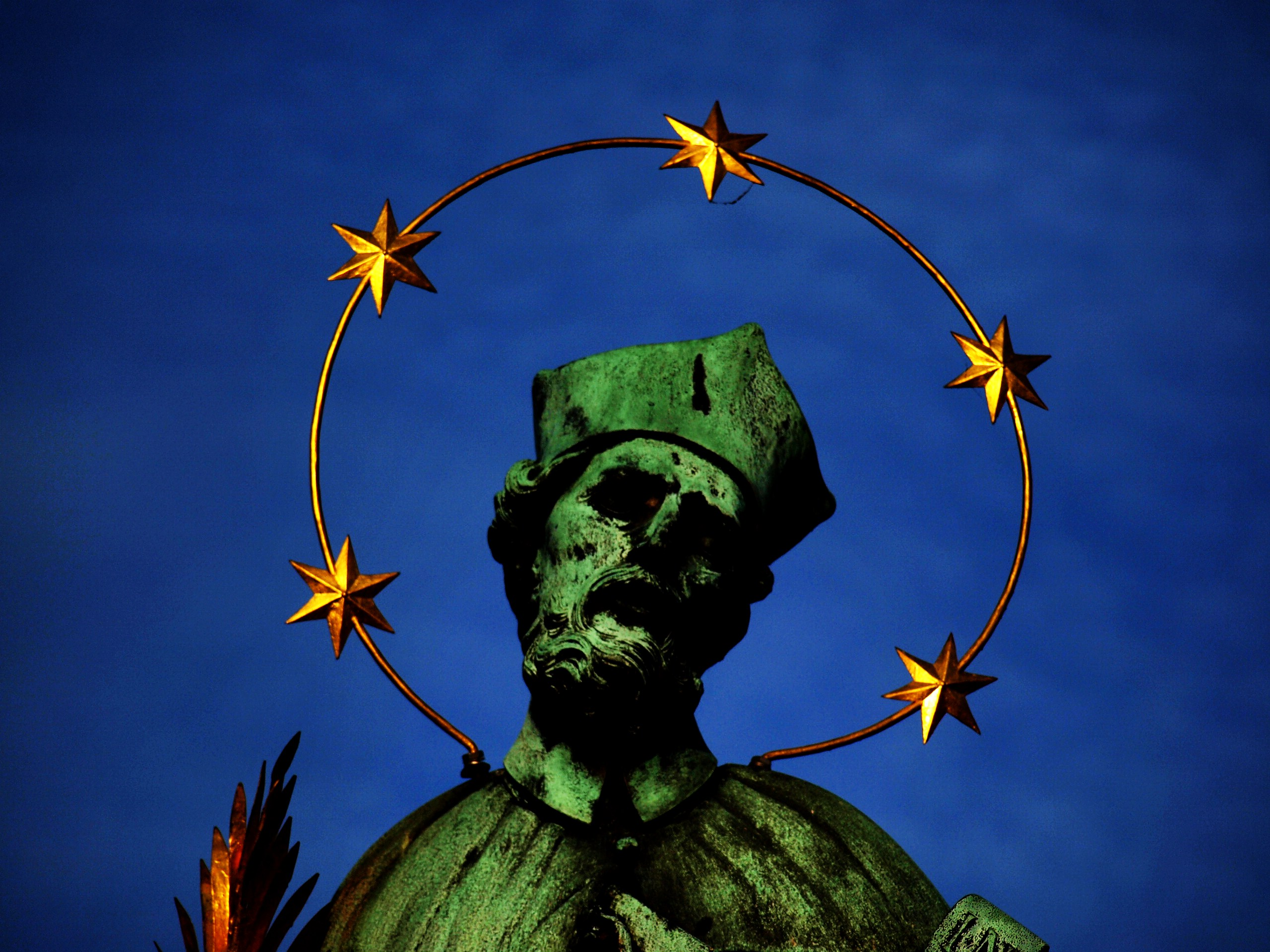 Svatý Jan Nepomucký - detail